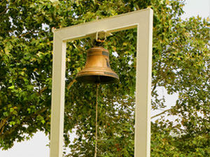 Periodismo 25